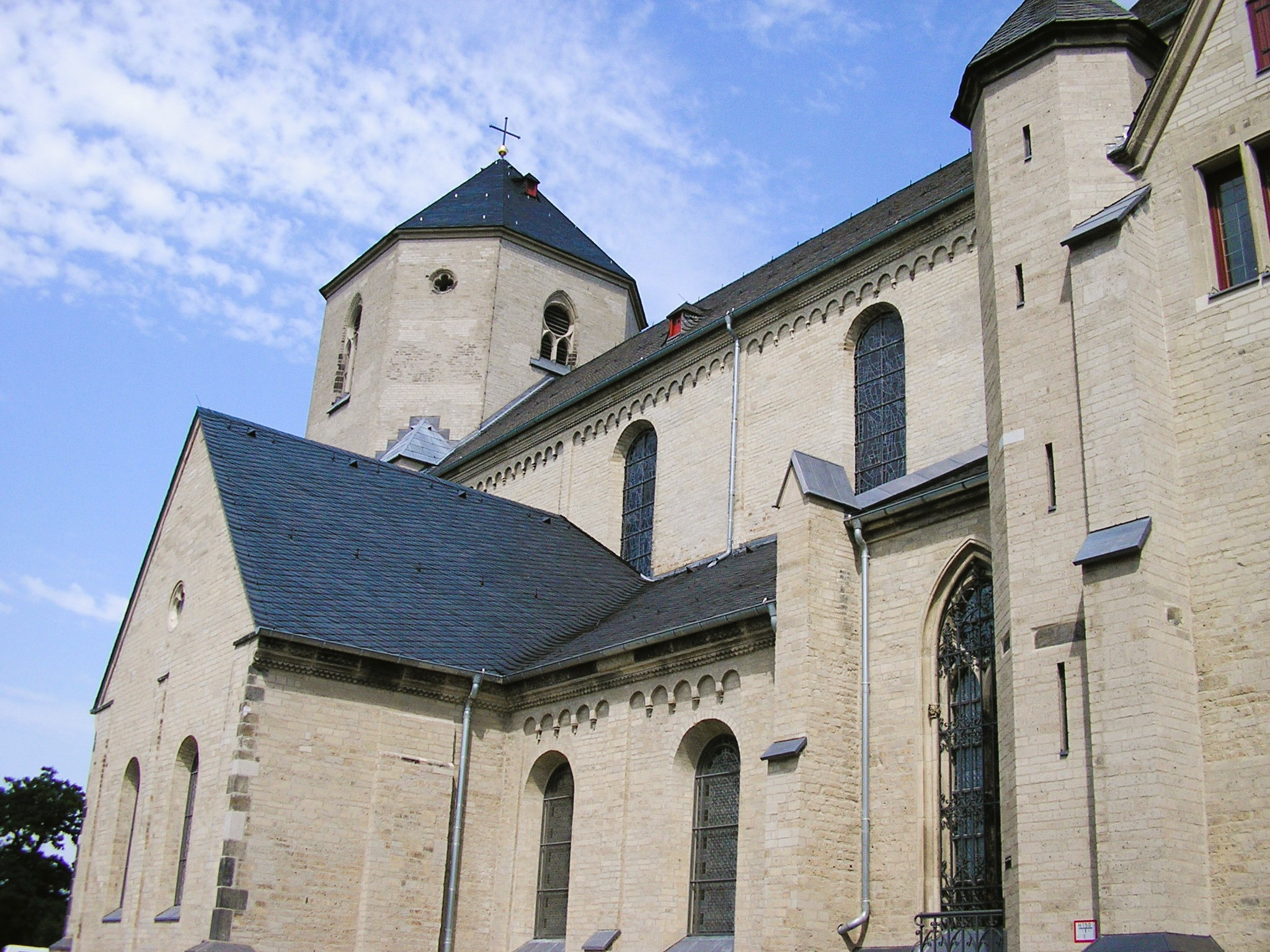 Münster zu Mönchengladbach nach der Renovierung